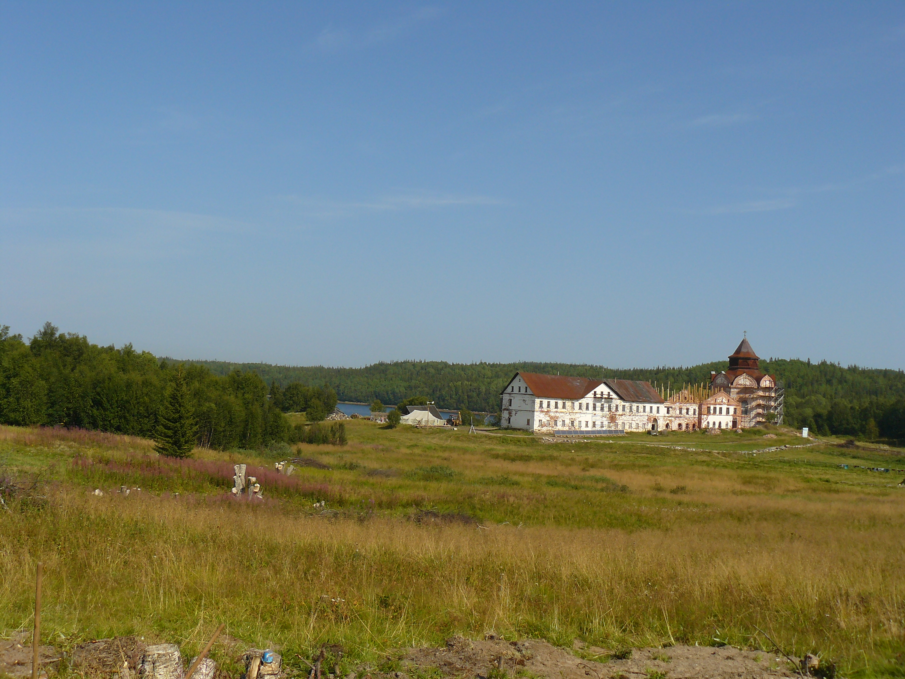 Скит на острові Анзерському